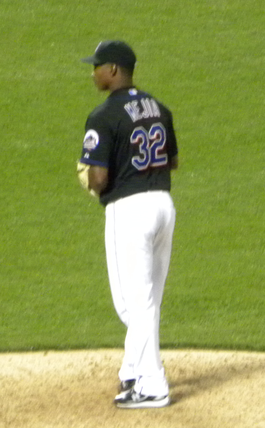 Jenrry Mejia